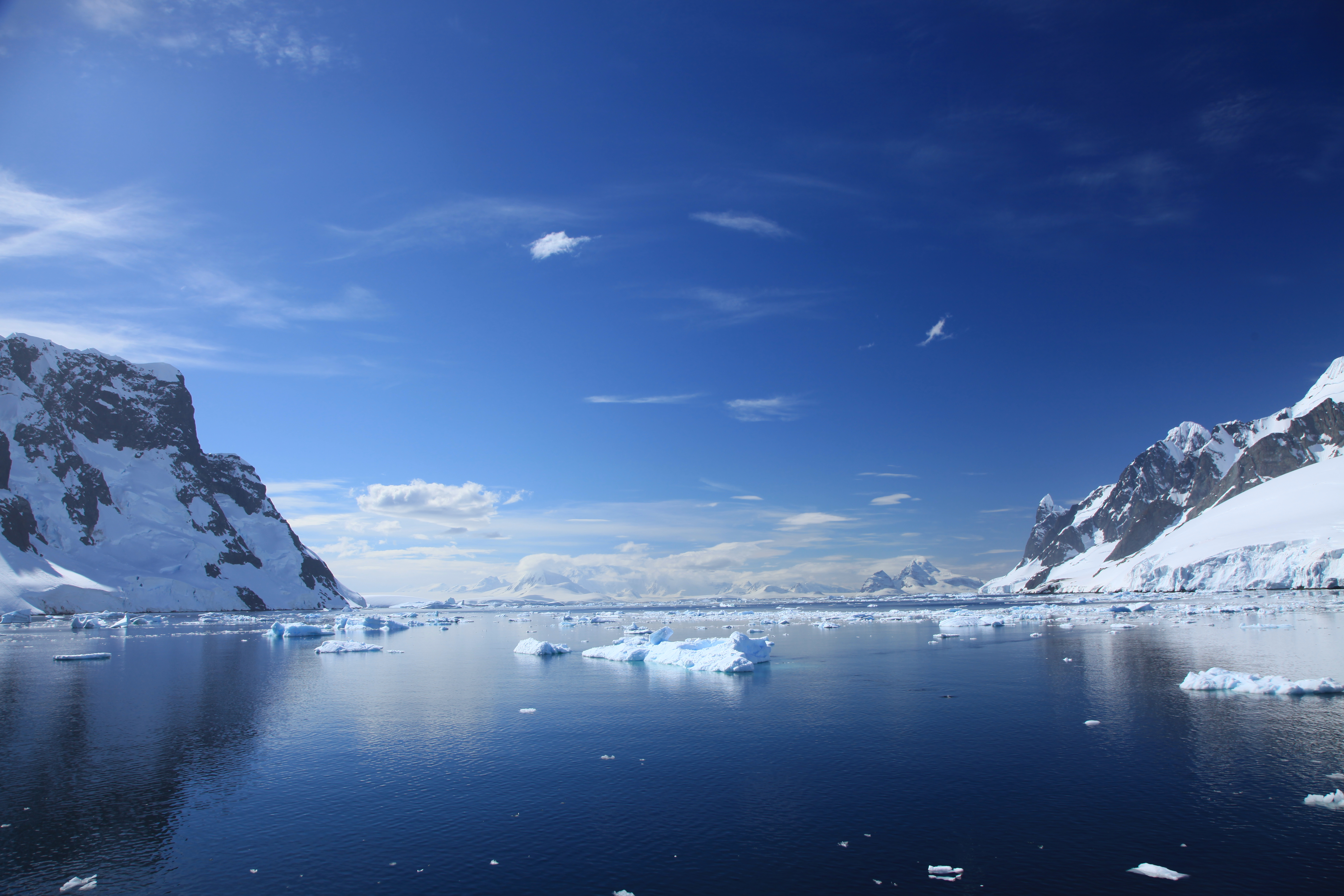 Lemaire Channel, Antarctica